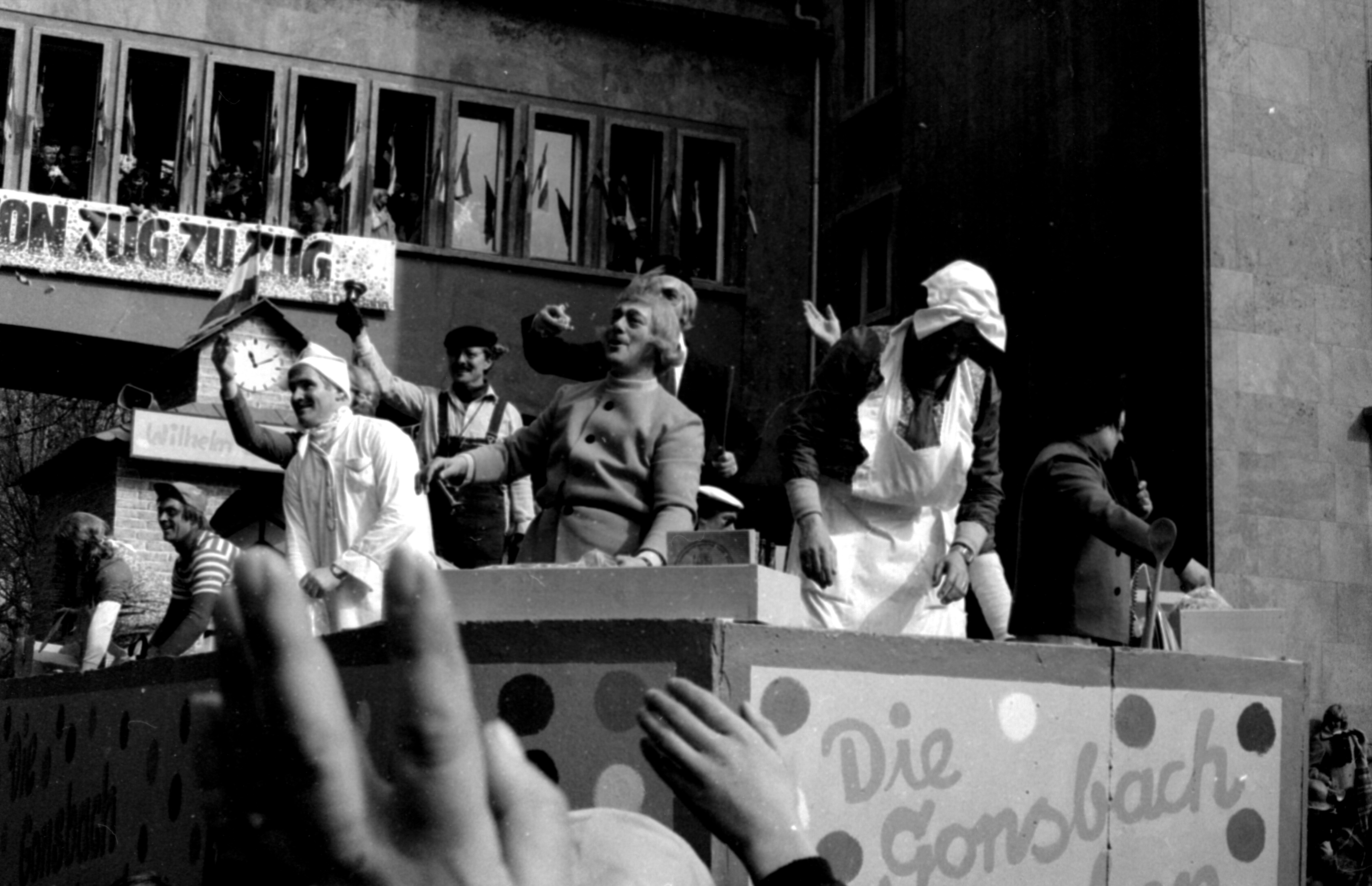 Mainzer Rosenmontagsumzug 1981 am 2. März 1981